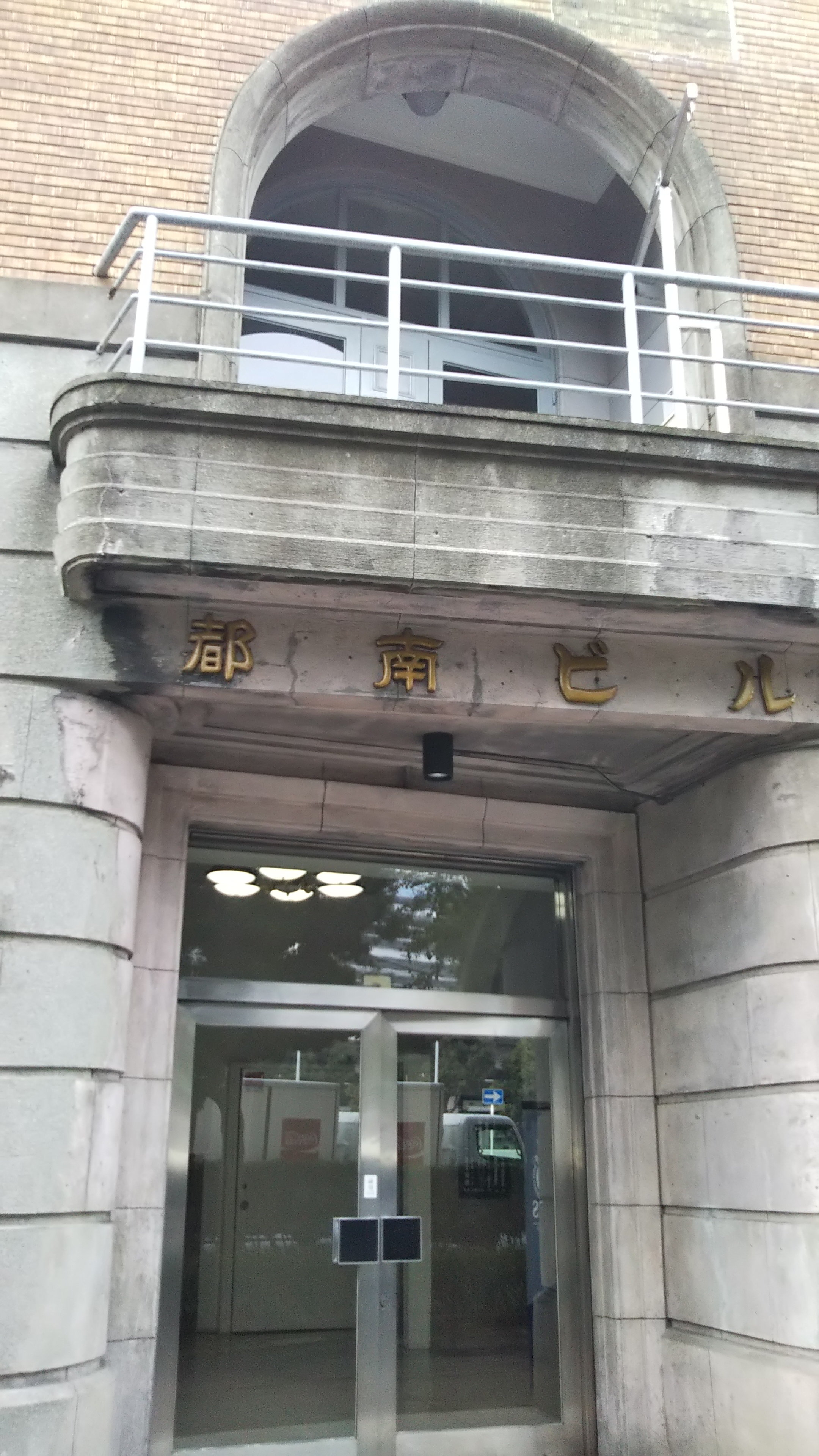 横浜市中区吉田町、都南ビル（旧 都南貯蓄銀行本店）